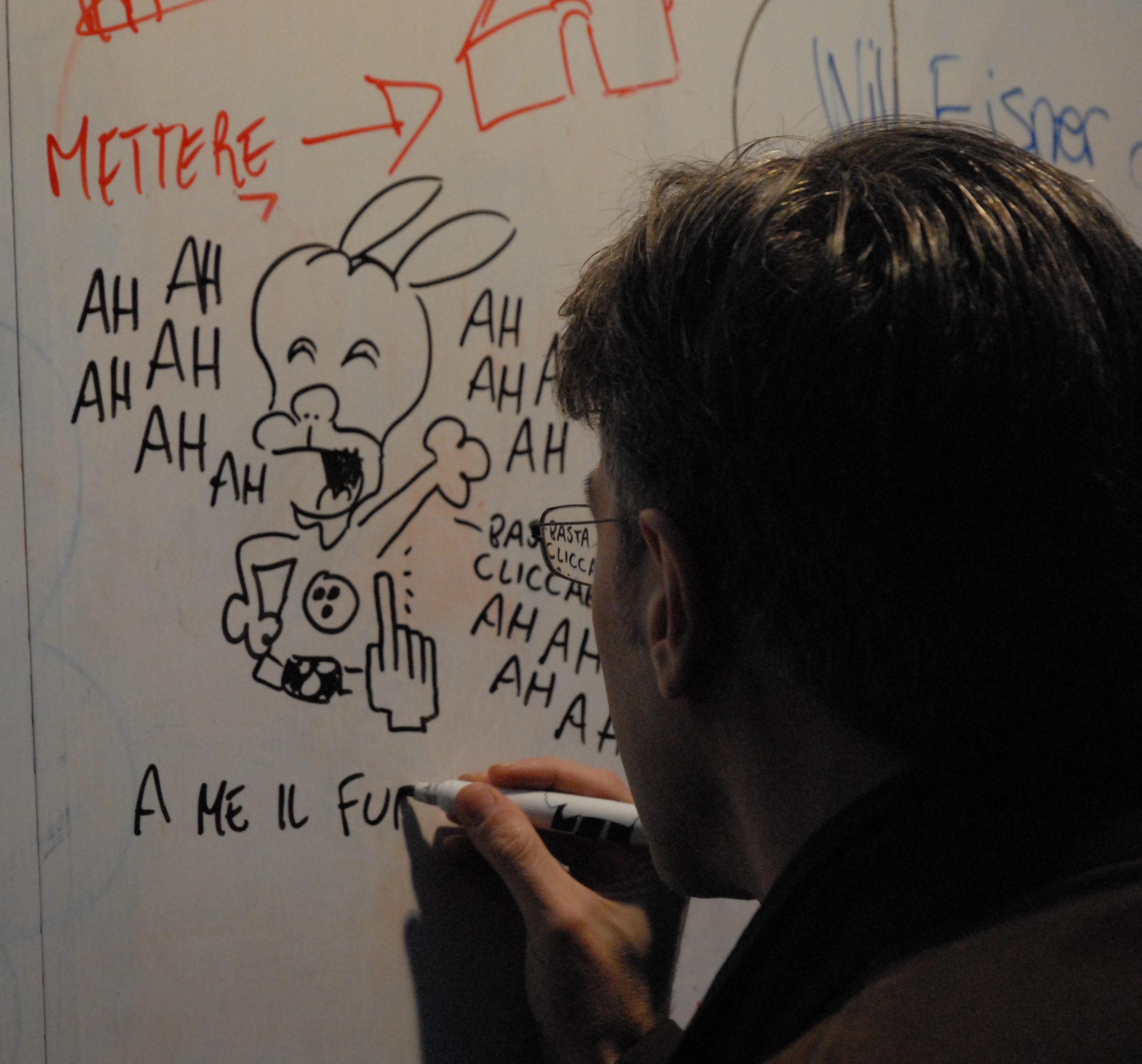 Leo Ortolani disegna sul Wikiwall di Wikimedia Italia Photo taken during Lucca Comics&Games 2010